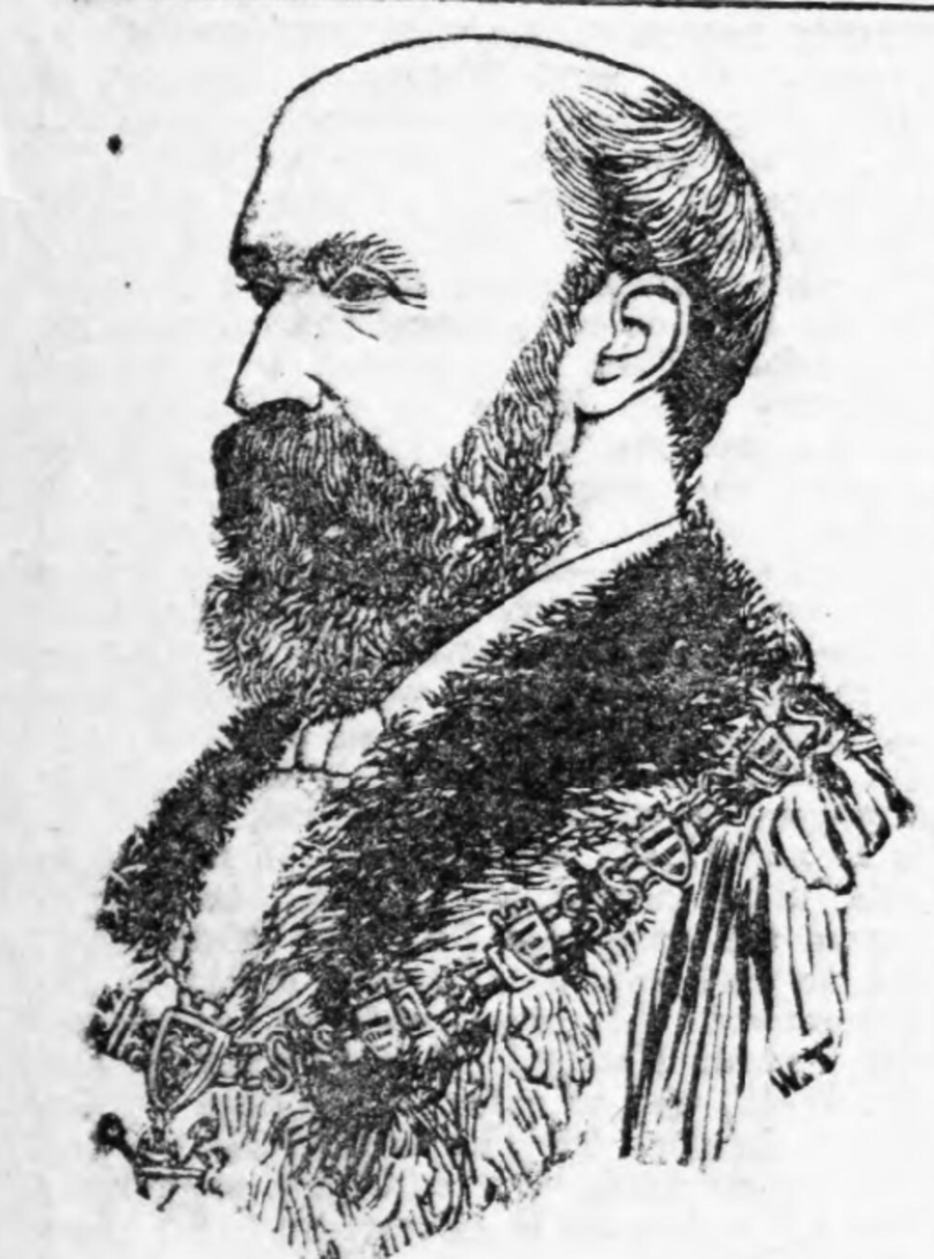 Darlun o J Aeron Thomas yn gwisgo gwisg Maer Abertawe ym 1897. Ym 1900 fe'i ethowyd yn AS Gwyr